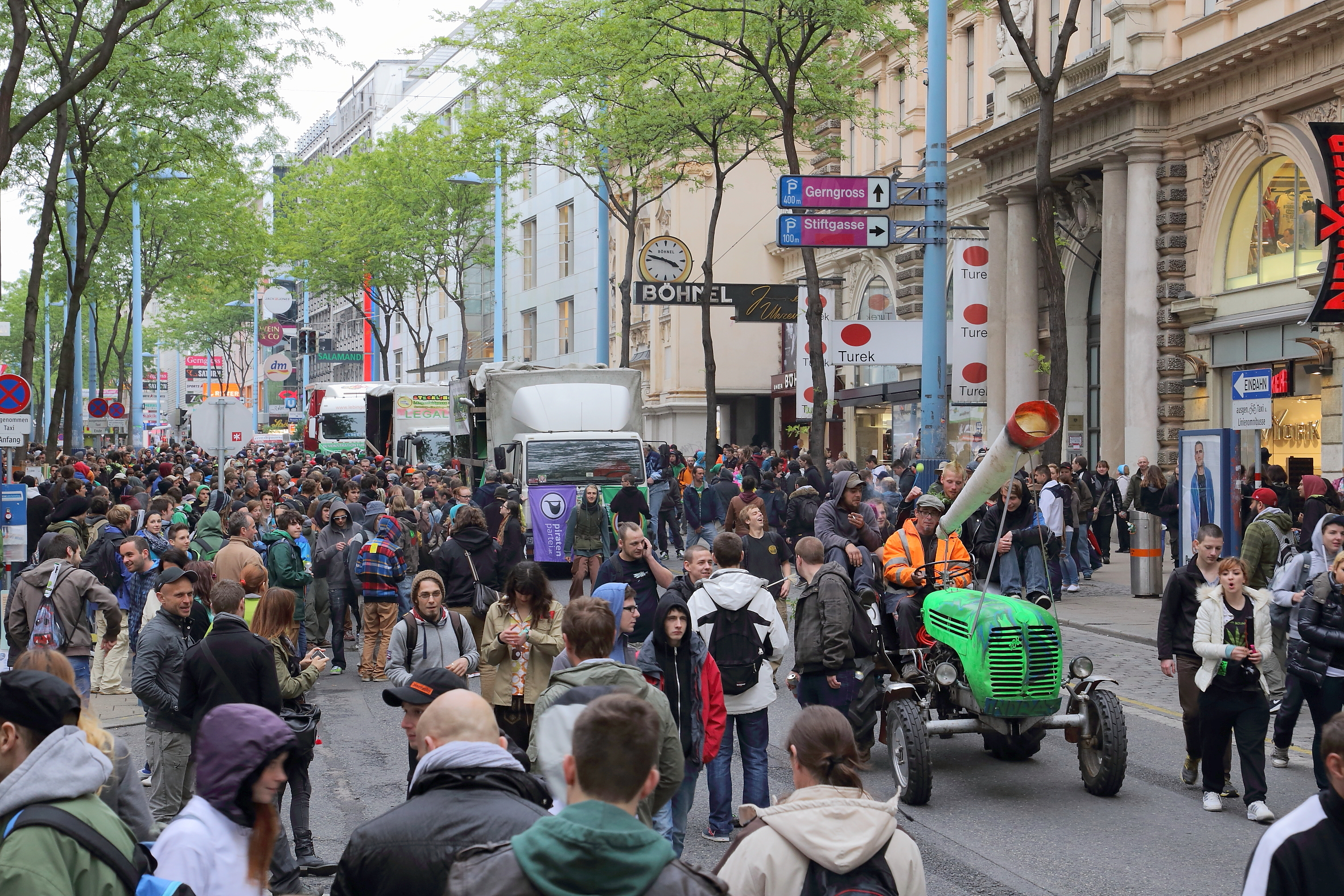 "Hanfwandertag" am 3. Mai 2014 in Wien auf der Mariahilferstraße im Zuge des Global Marijuana March.